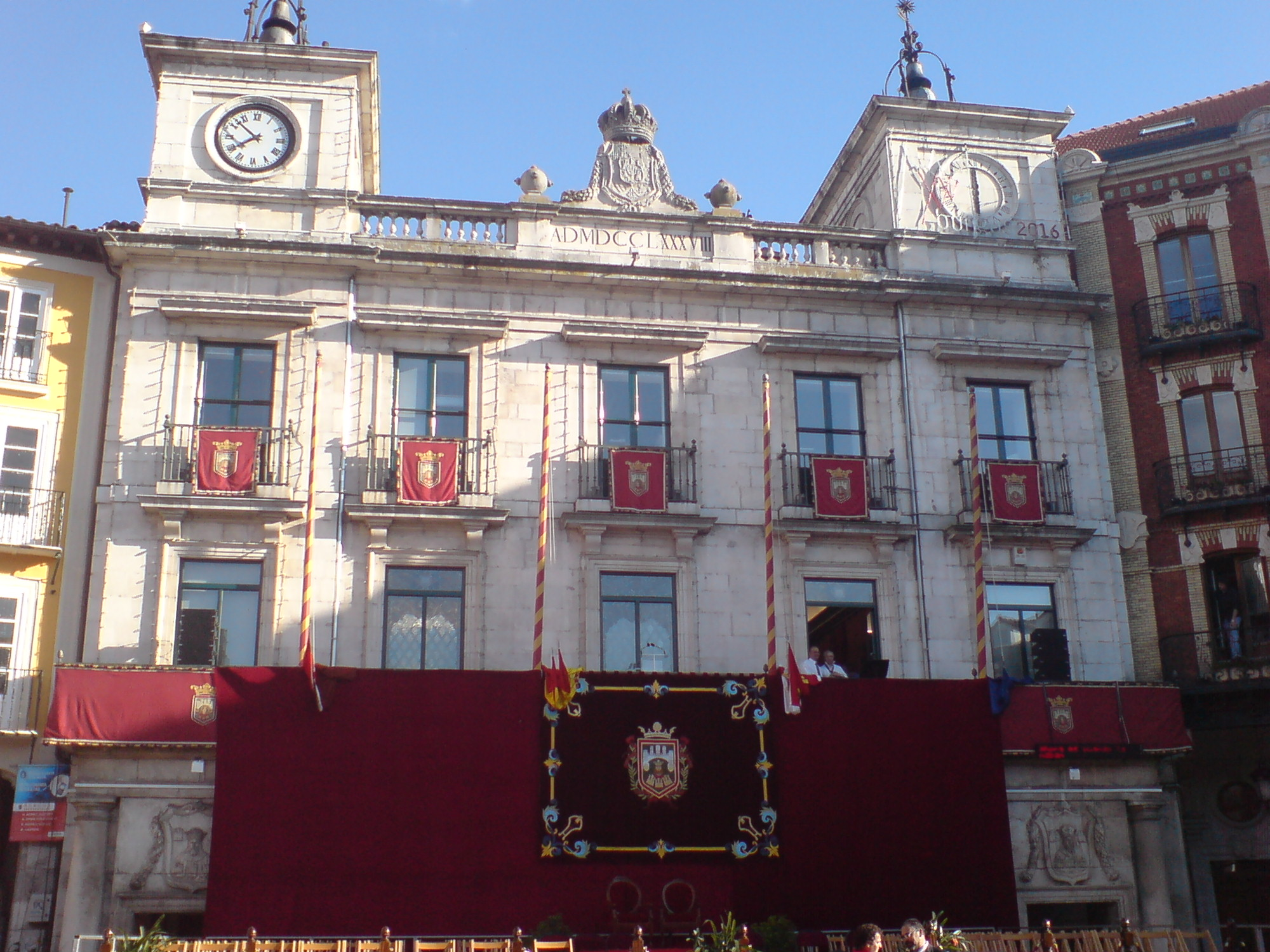 Fachada del Ayuntamiento de Burgos, obtenida en los Sampedros del año 2009.